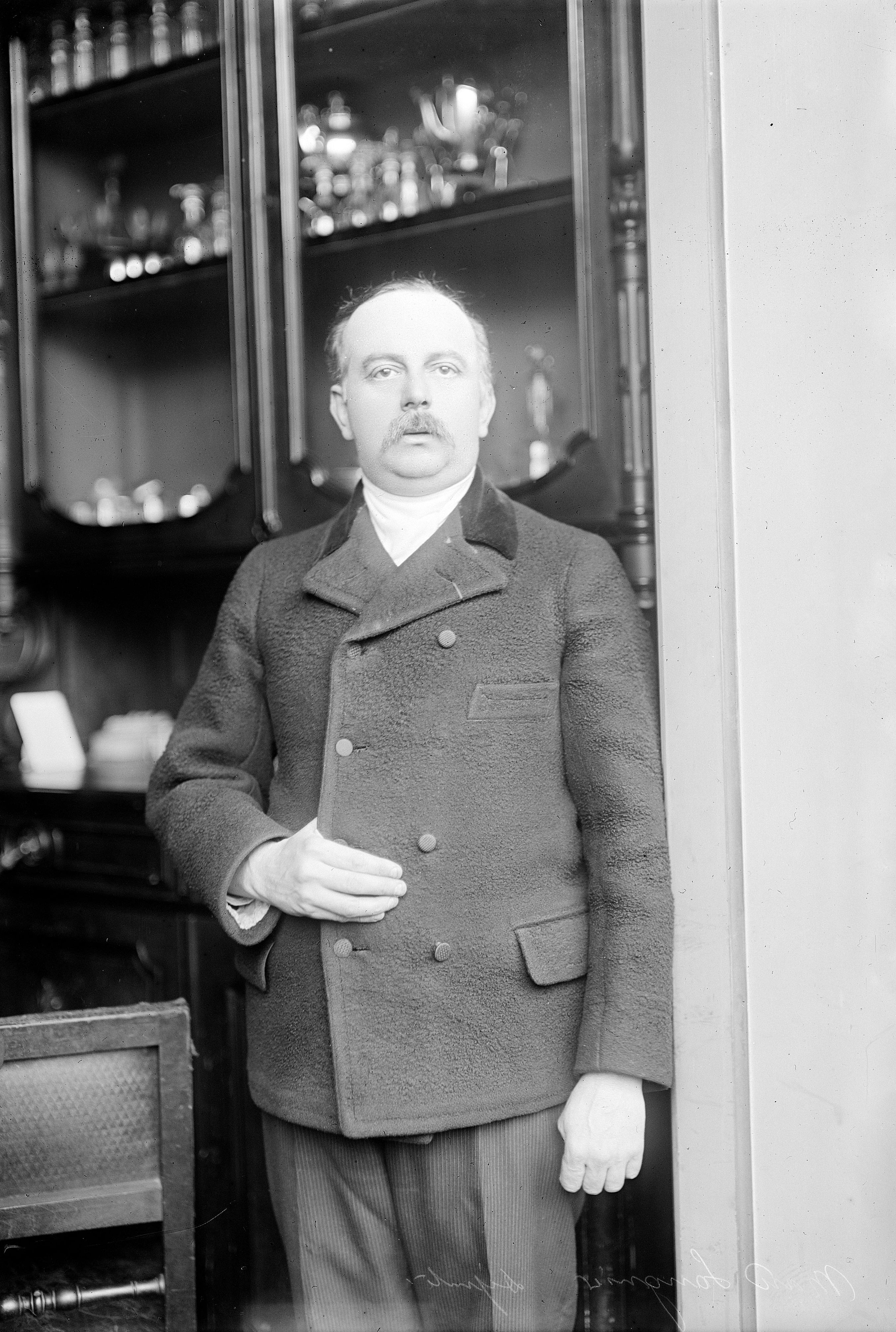 Marc Sangnier, député, en 1919